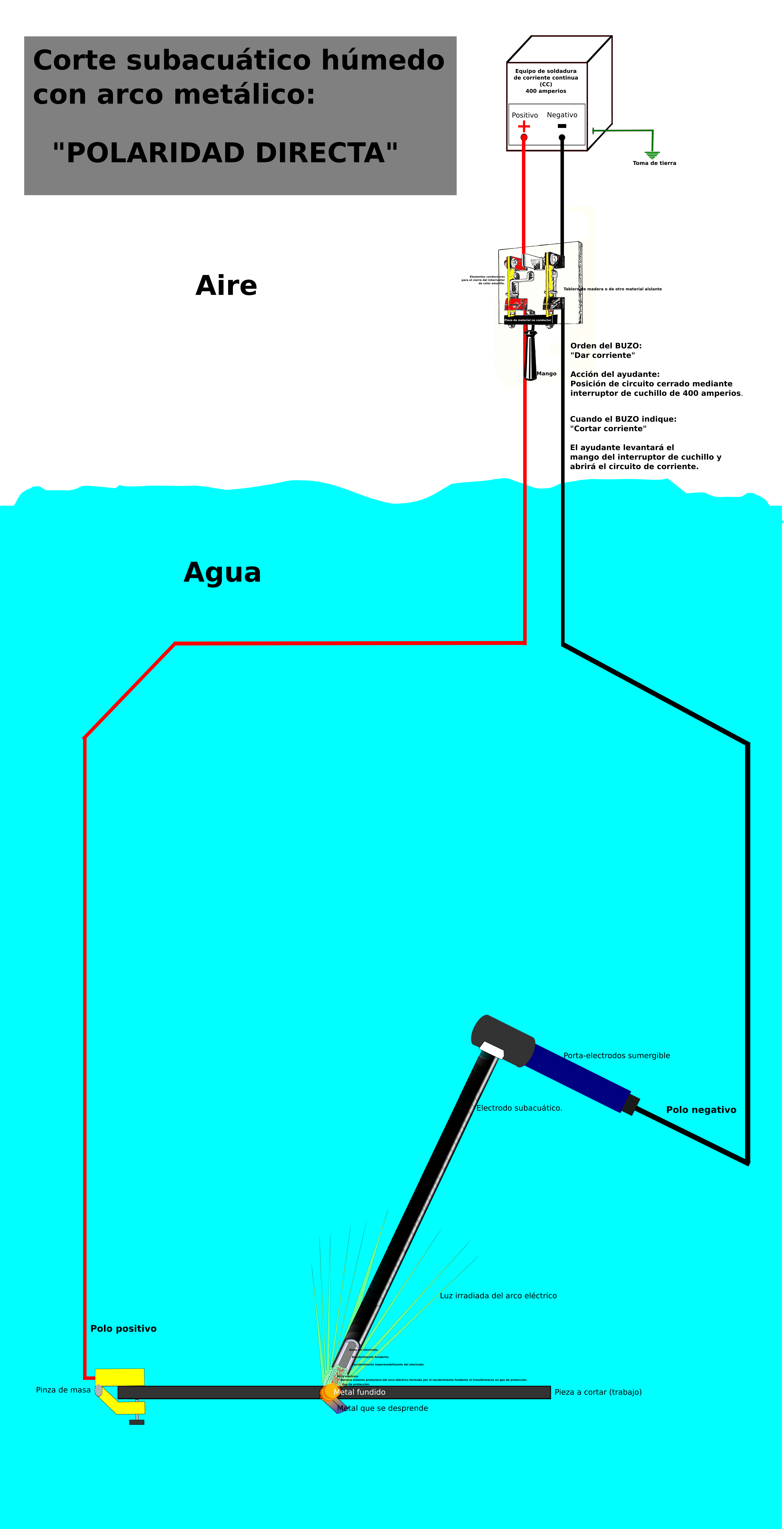 Corte subacuático con arco metálico y polaridad directa.